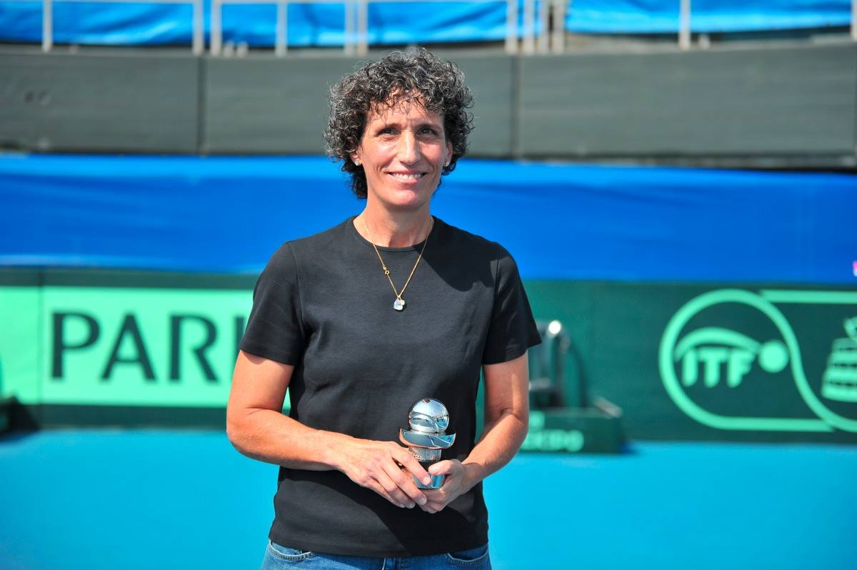 אילנה ברגר מקבלת את פרס COMMITMENT AWARD